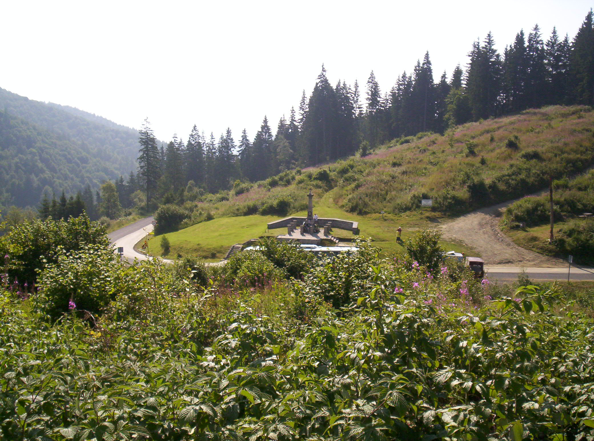 A nyergestetői ütközet emlékműve – photo taken by uploader User:Csanády in 2006.